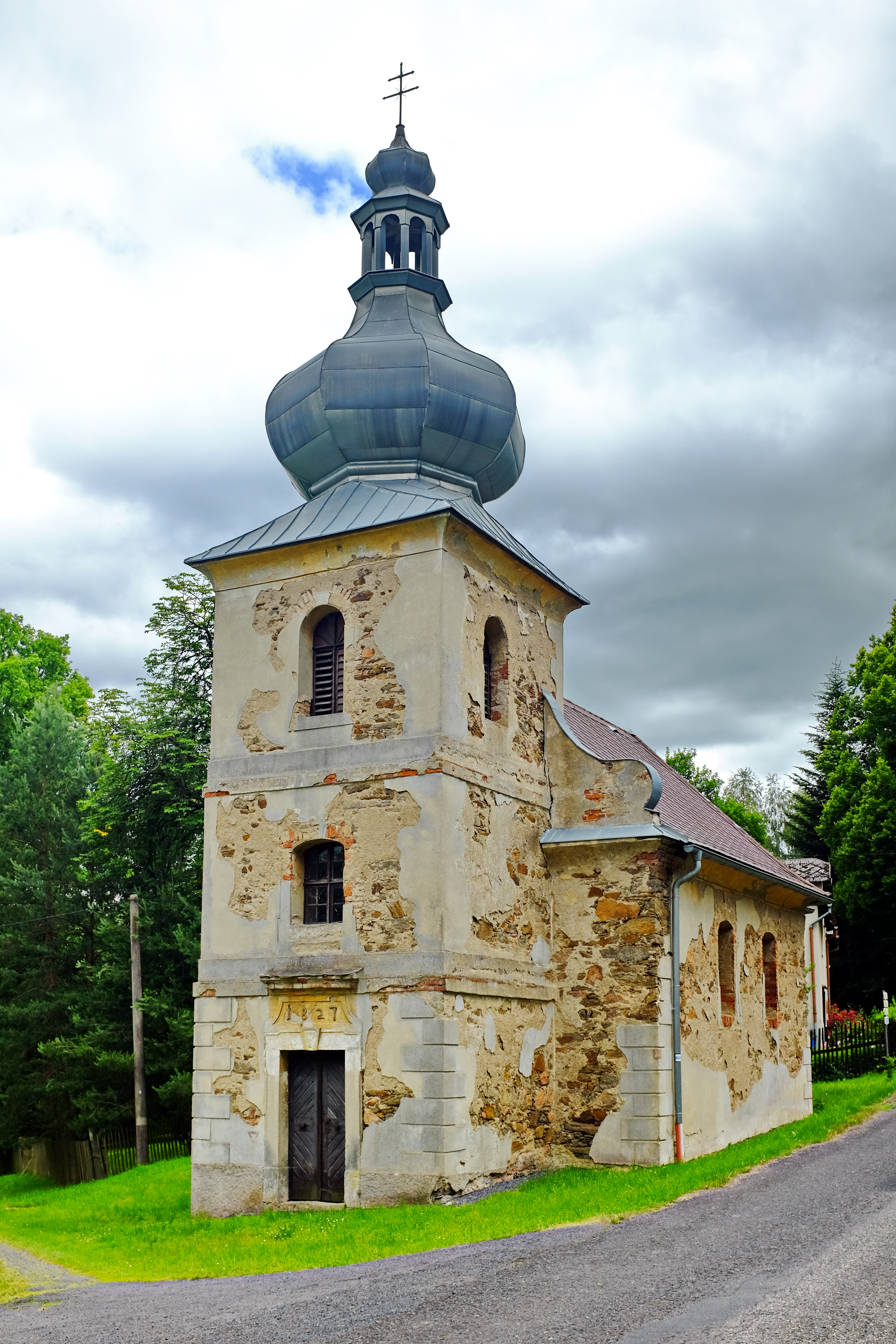 Kaple svatého Floriána, Svinov, Svinov (Útvina).